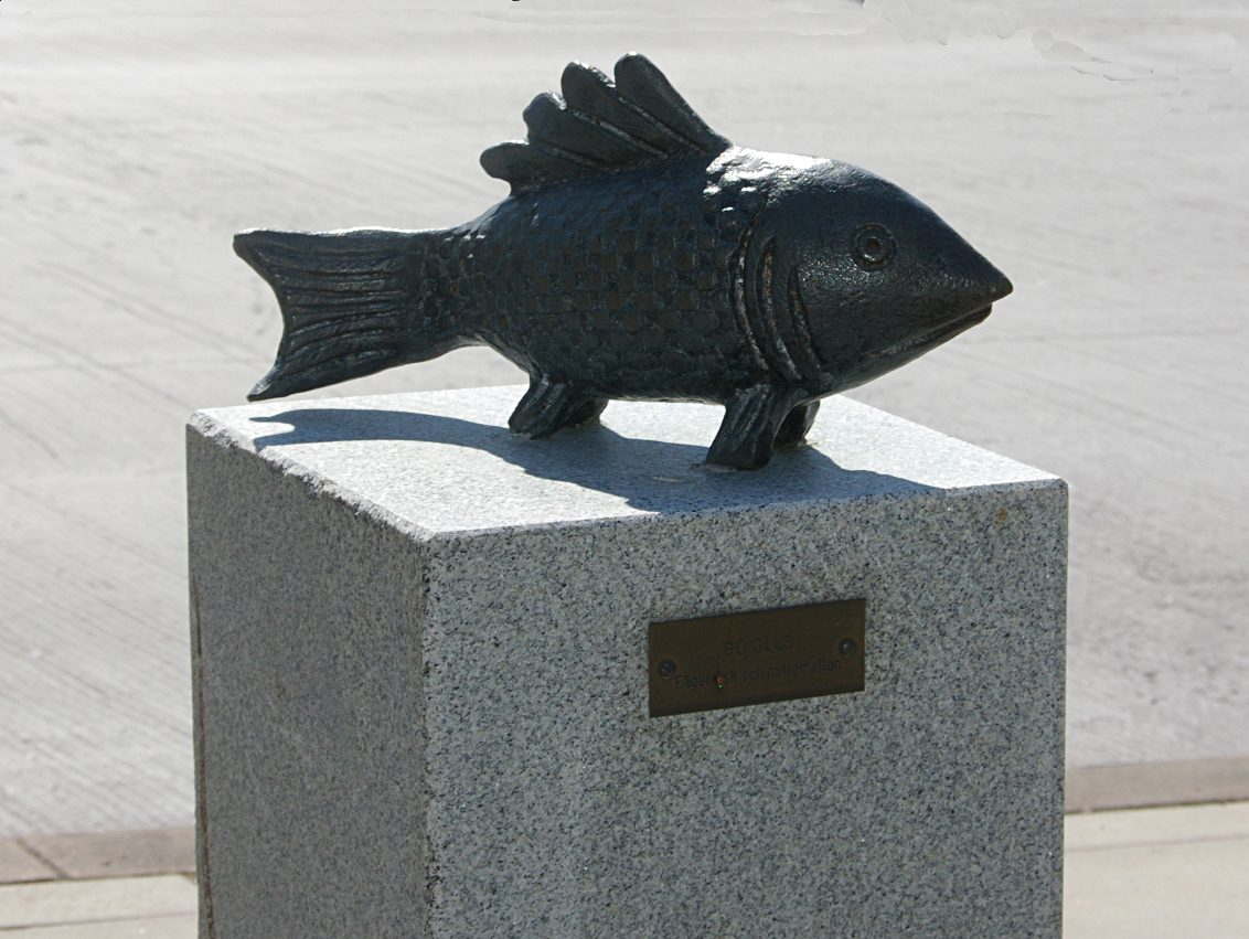 "Fågel, fisk och mittemellan", konstverk av Bo Olls, placerat vid södra entrén, US, Linköping.